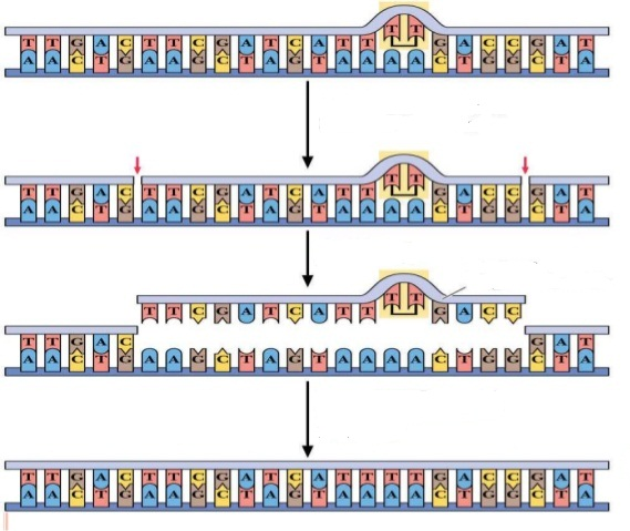 hbhub